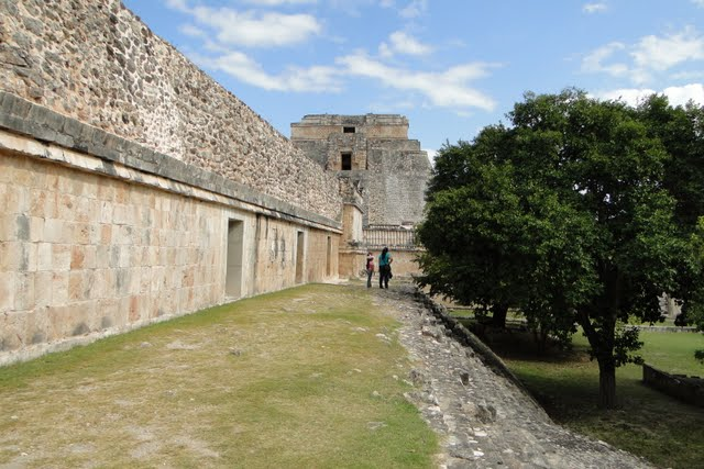 Ушмаль. Слева «Женский монастырь», вдали пирамида «Волшебника»